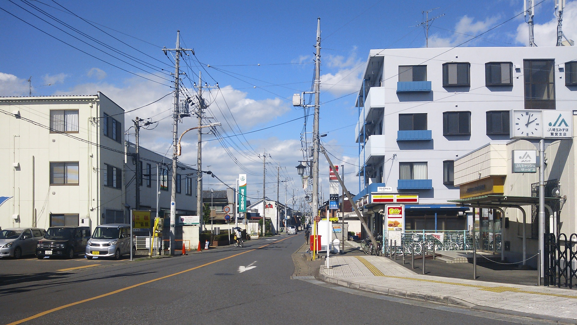 東武鉄道鷲宮駅駅前の写真。